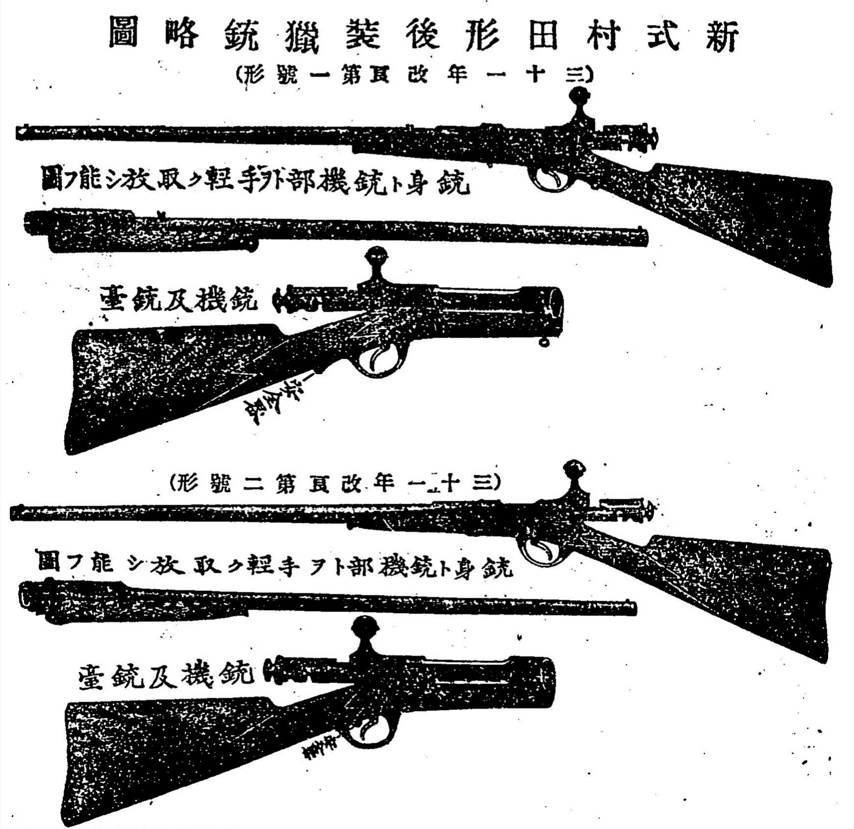 金丸鉄砲店製の村田銃